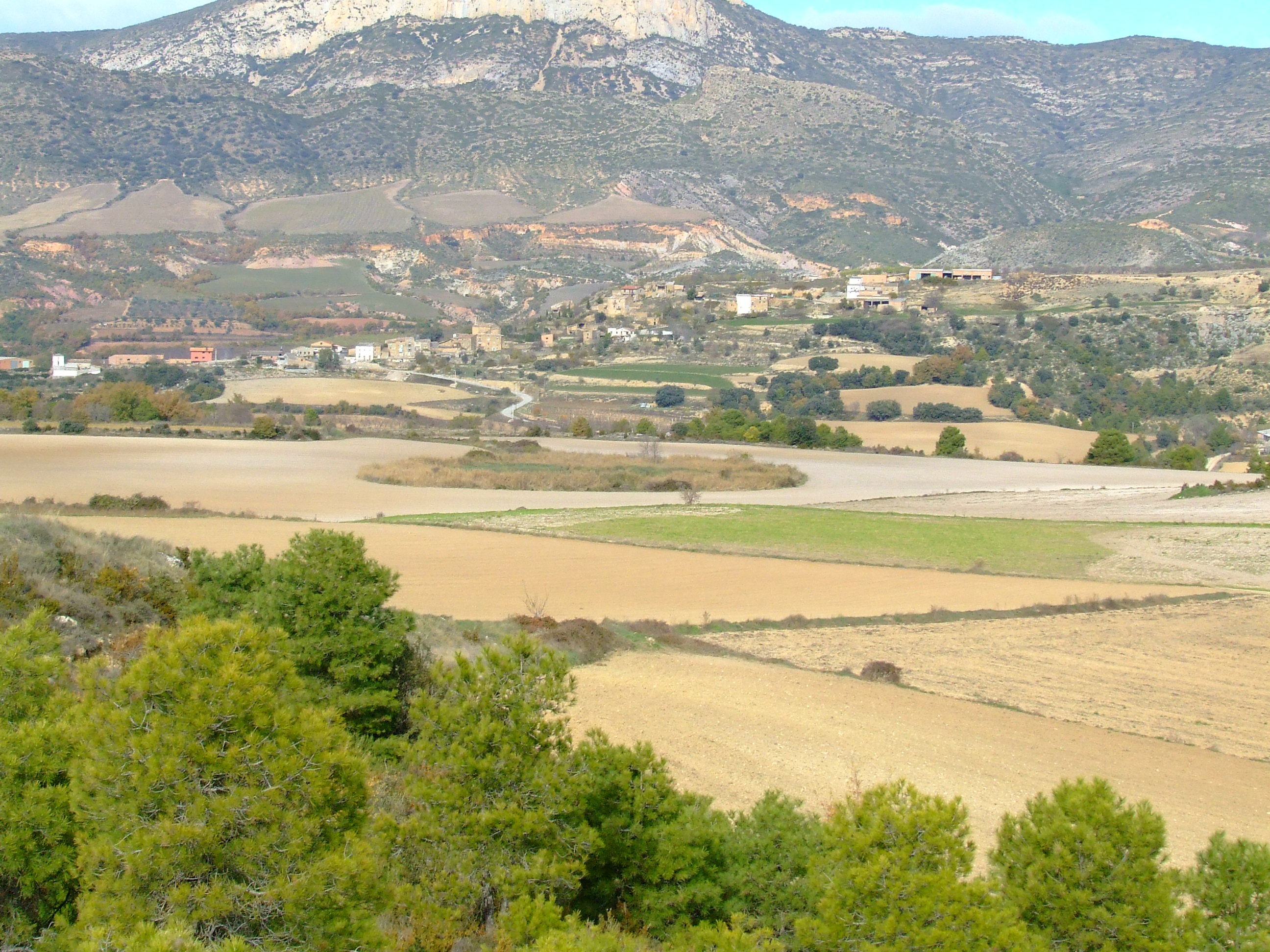 Estany petit de Basturs (Orcau, Isona i Conca Dellà, Pallars Jussà)